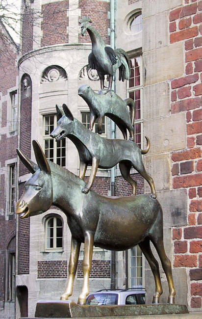 Die Bremer Stadtmusikanten geschaffen von Gerhard Marcks am Bremer Rathaus.